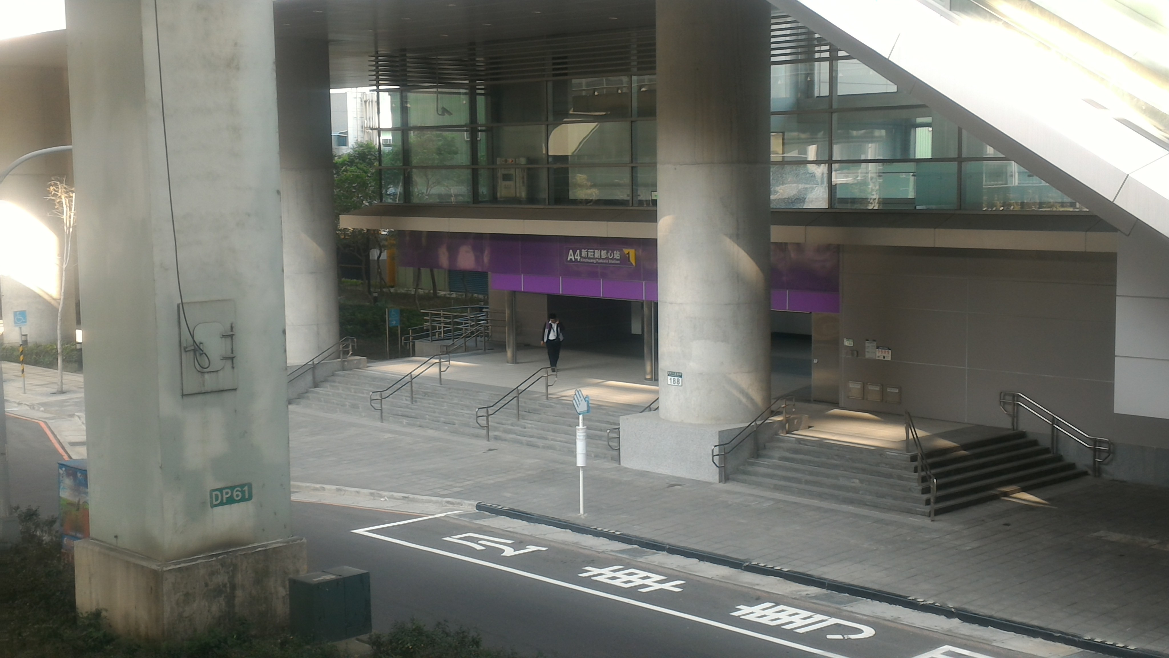 桃園國際機場捷運新莊副都心站1號出口。